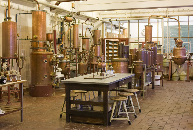 Produktion in der PSM